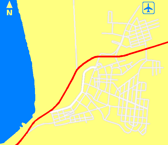 Mapa de Chañaral, Chile